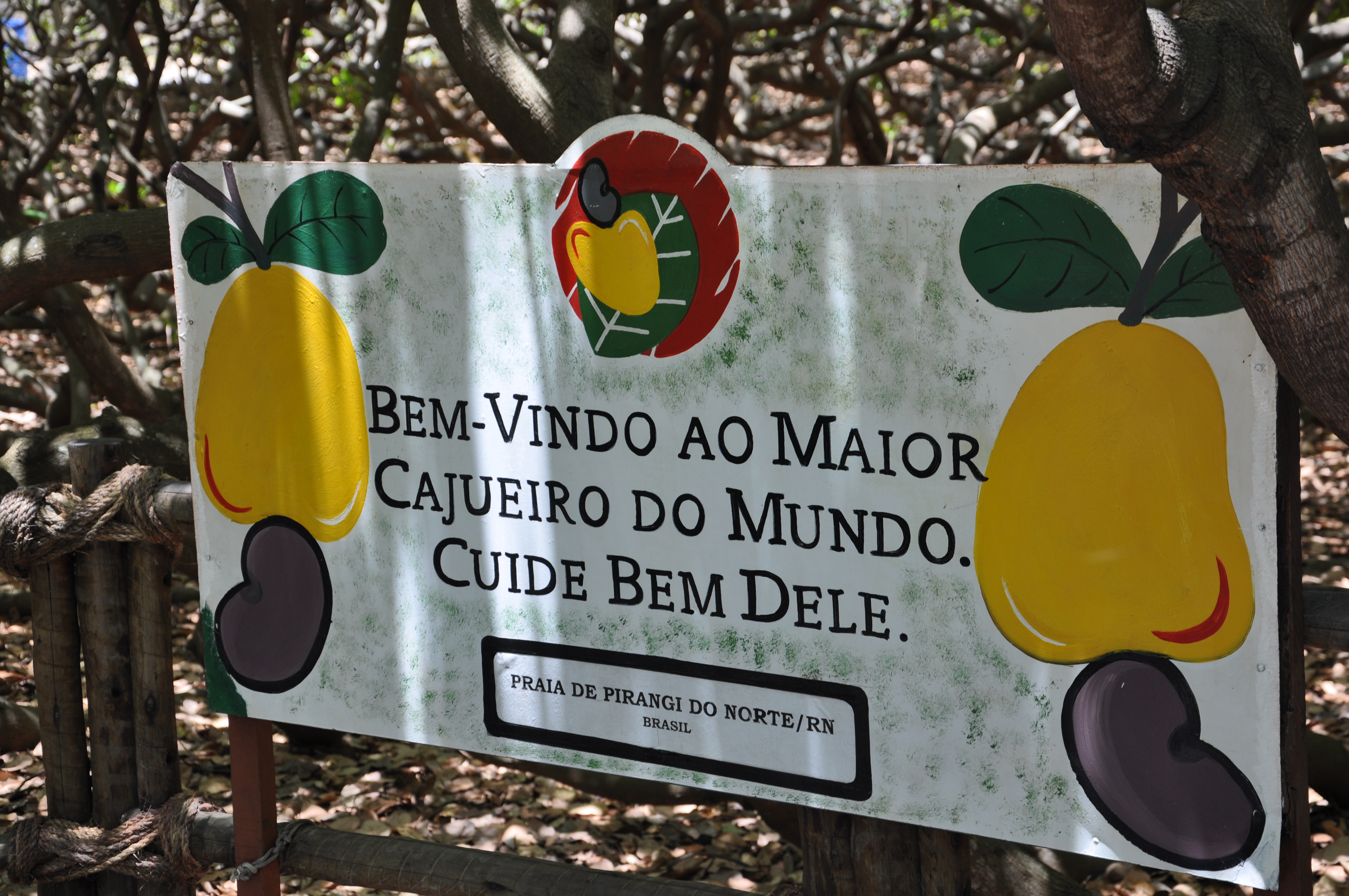 Maior cajueiro do mundo